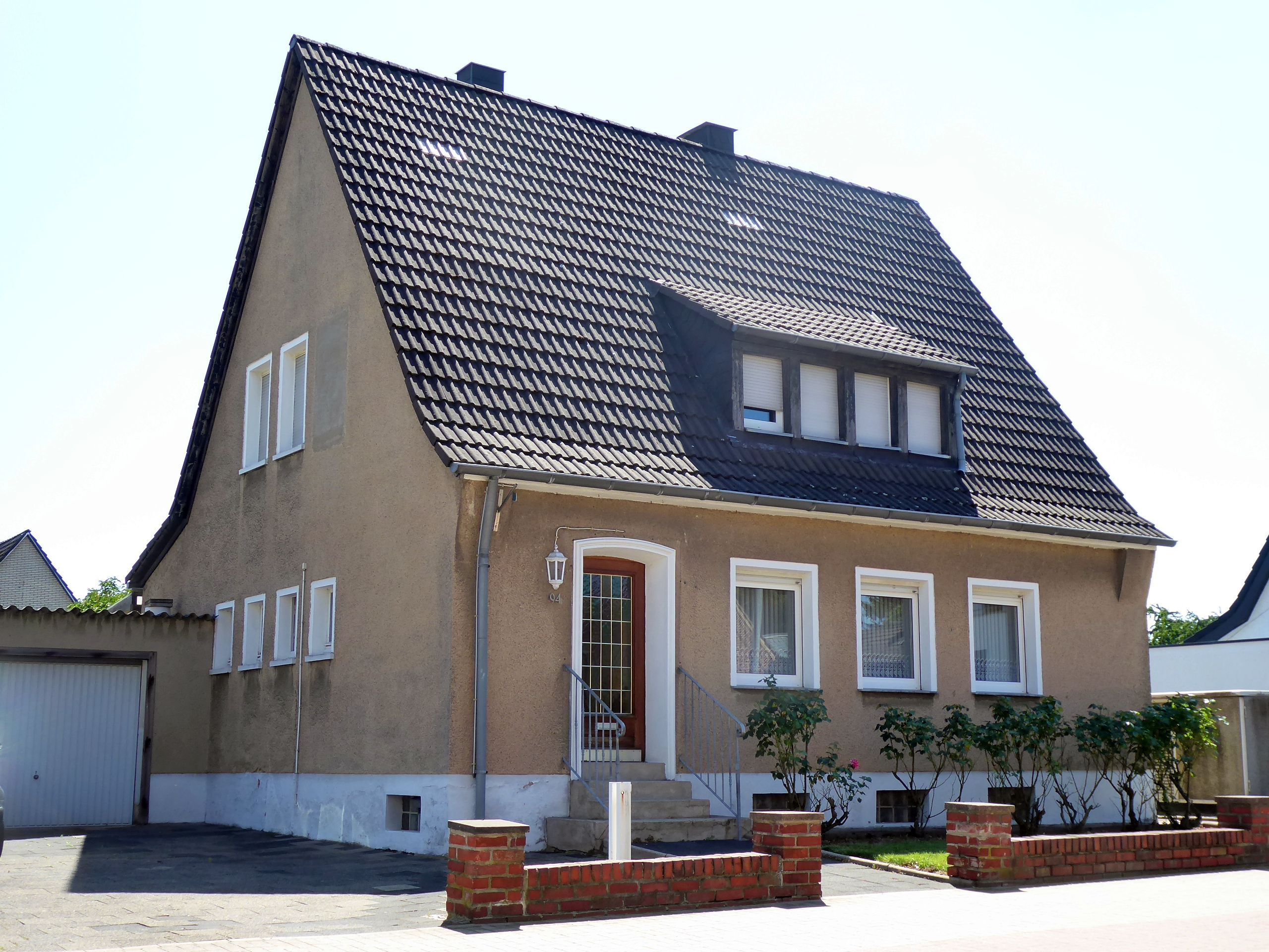 Wohnhaus in Grevenbroich. Drehort für den Film "Horst Schlämmer – Isch kandidiere!"